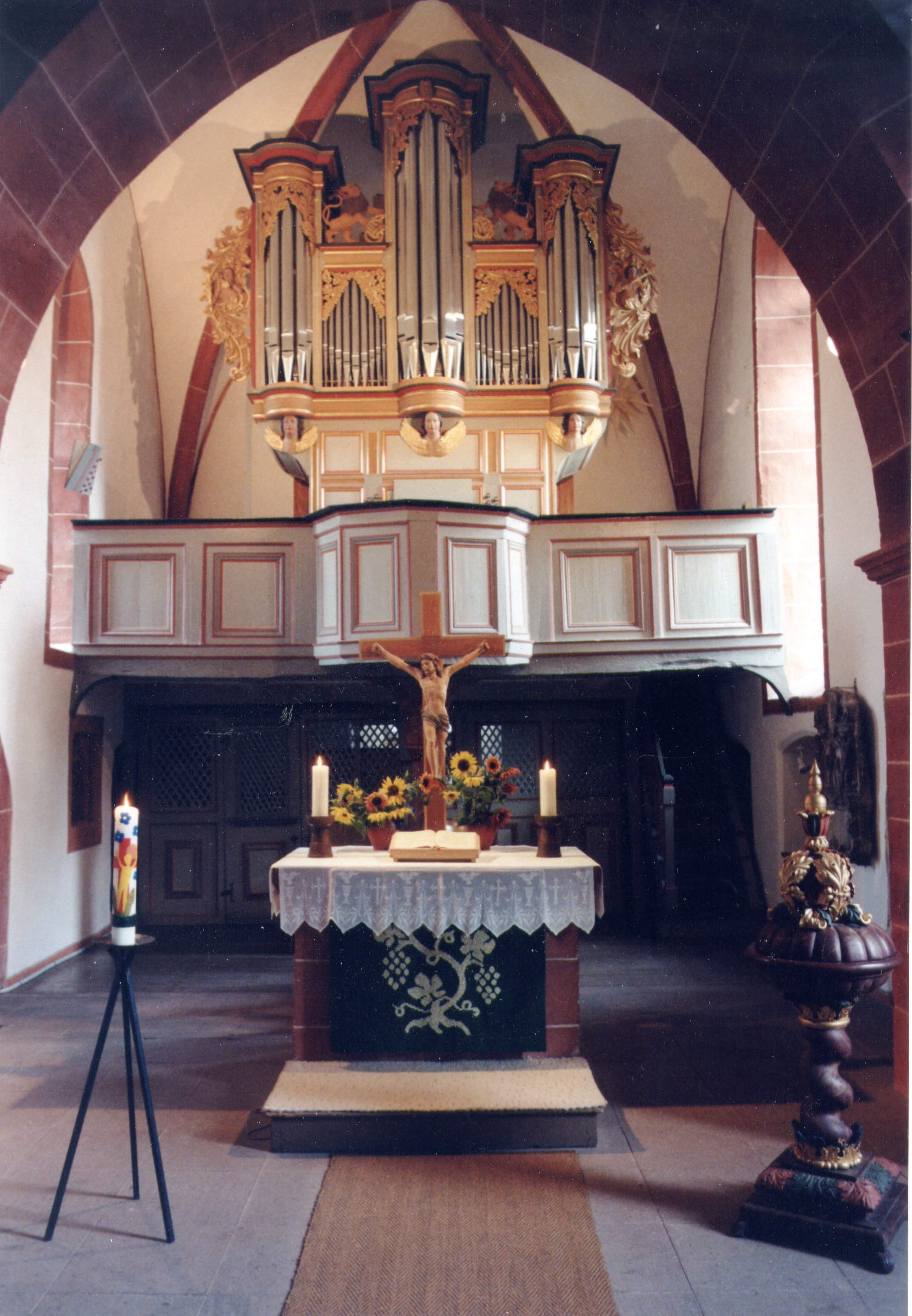 Evangelische Kirche in Allendorf/Lumda, Hessen